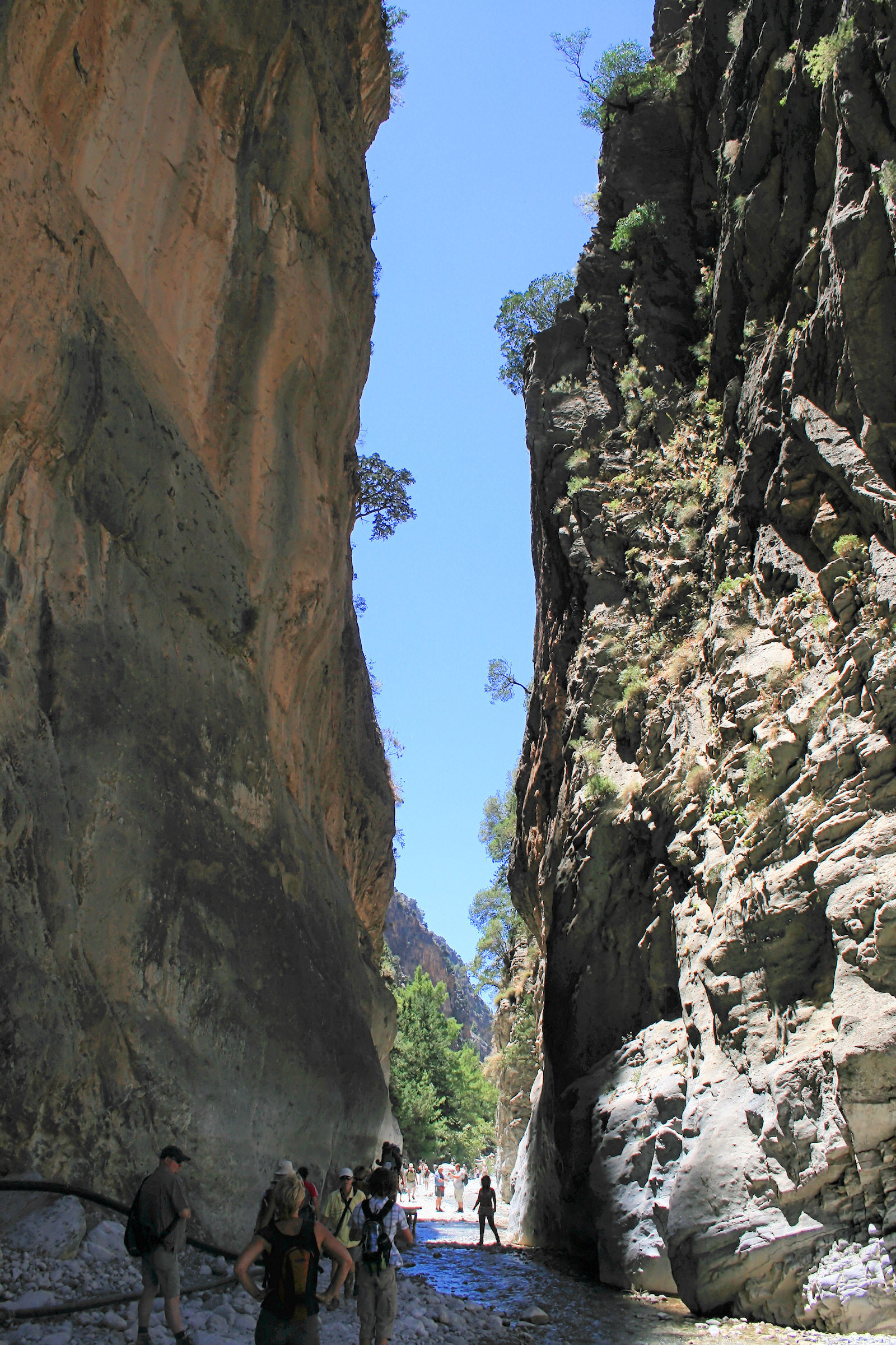 Das 3. Felsentor in der Samaria-Schlucht auf der Insel Kreta